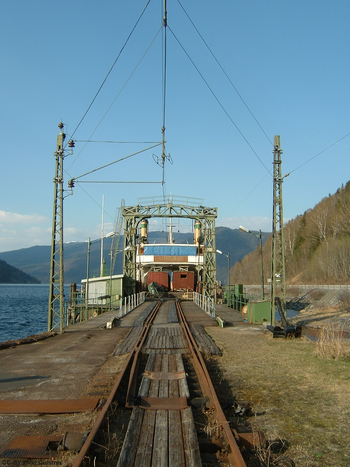 De veerboot Ammonia van de Rjukanbanen aan de aanlegsteiger van Mæl (Noorwegen), mei 2006. Eigen foto.